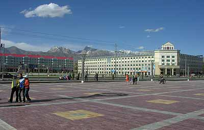 Straßenszene in Delingha, der Hauptstadt des Autonomen Bezirks Haixi der Mongolen und Tibeter in der chinesischen Provinz Qinghai Foto: eigenes Foto (Andreas Gruschke, Freiburg)